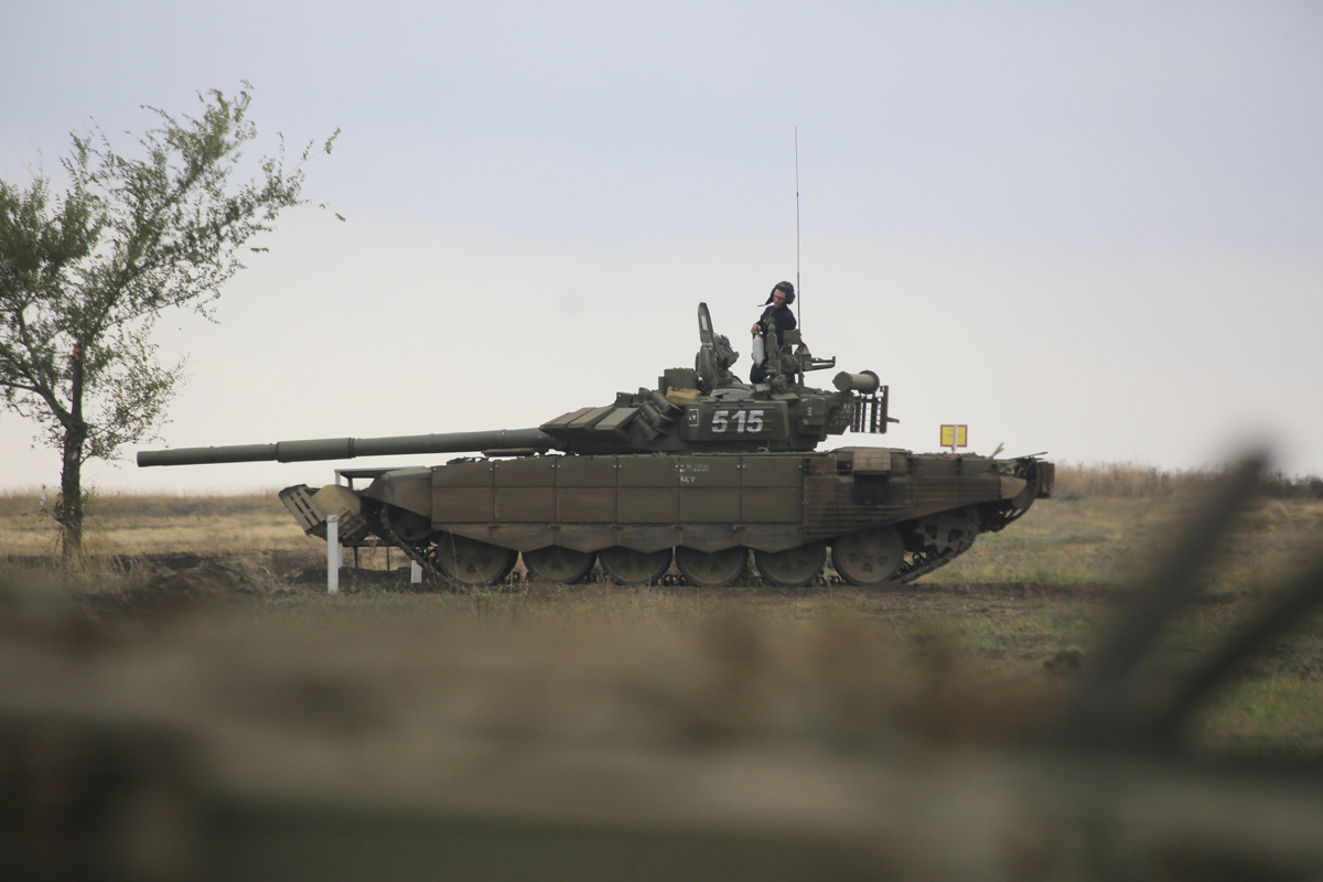 Контрольные стрельбы танкистов ЮВО в рамках итоговой проверки (полигон Кадамовский, Ростовская область).